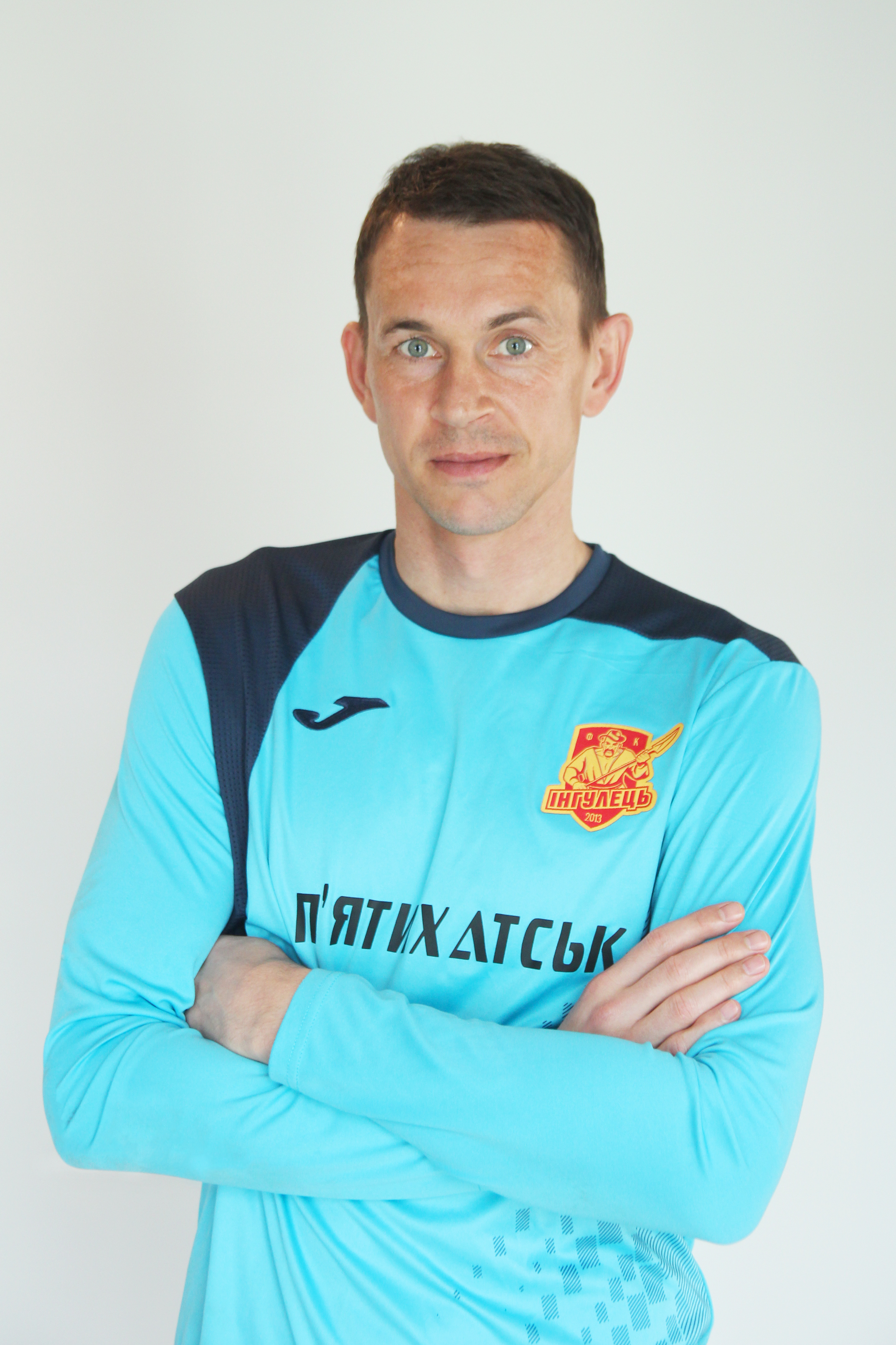 Богдан Шуст - голкіпер ФК "Інгулець"